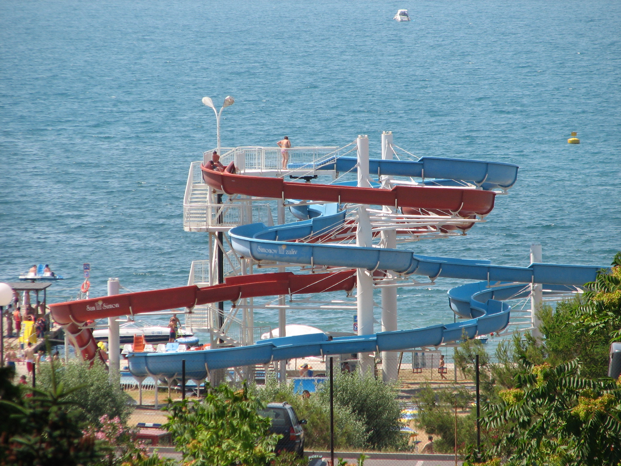 Water toboggan slide in Simonov zaliv, Izola, Slovenia